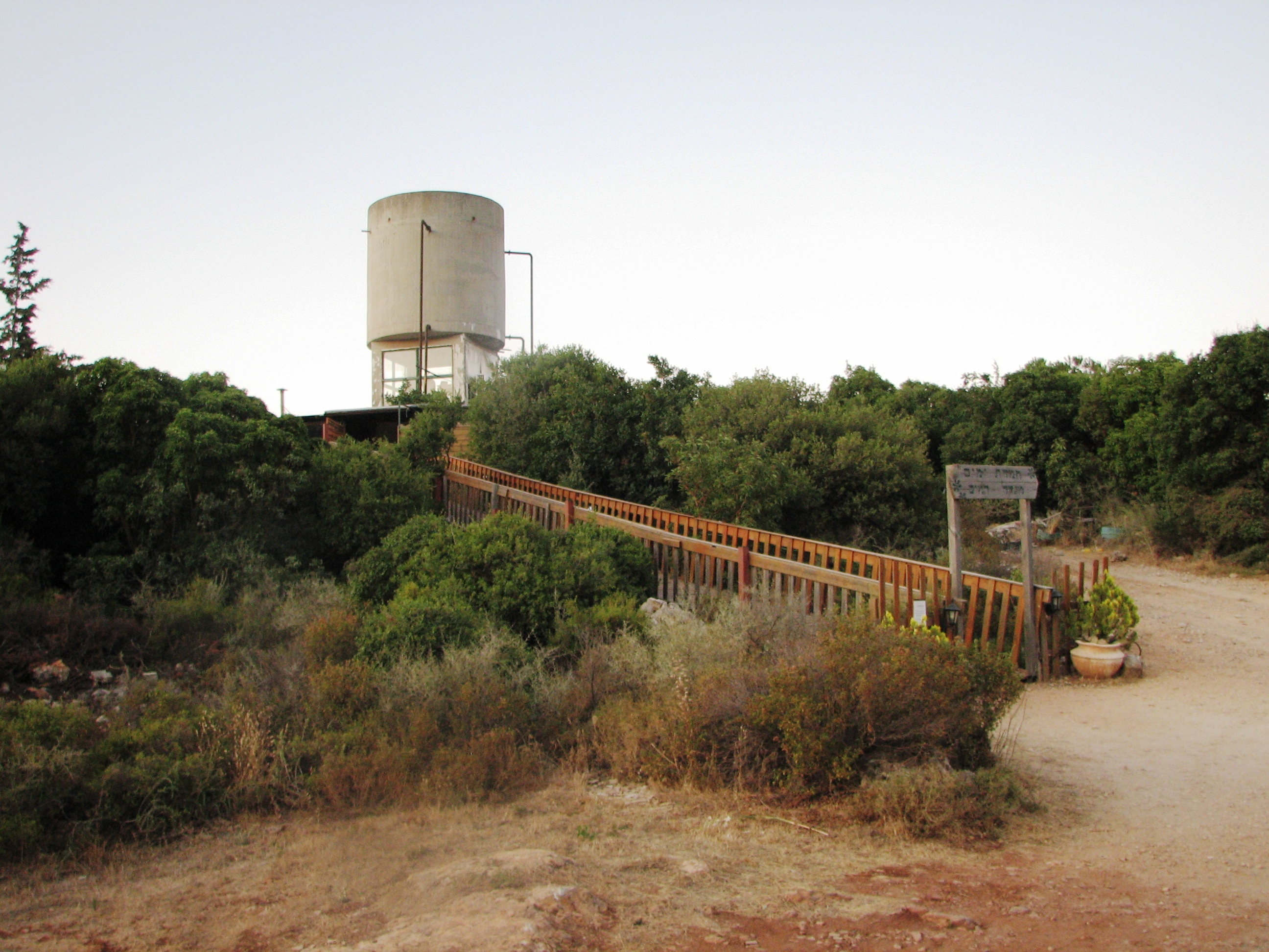 Hemdat Yamim חמדת ימים היא נקודת יישוב השוכנת בלב שמורת הטבע הר מירון, על פסגת הר בגובה 800 מטר מעל פני הים. במקום מתגוררת משפחה אחת ויש בה כמה חדרי ארוח, מסעדה ואולם קטן למופעים וקונצרטים. הגישה היחידה אל היישוב היא דרך כביש היוצא מהיישוב שפר הפאב והמסעדה, ליד מגדל המים